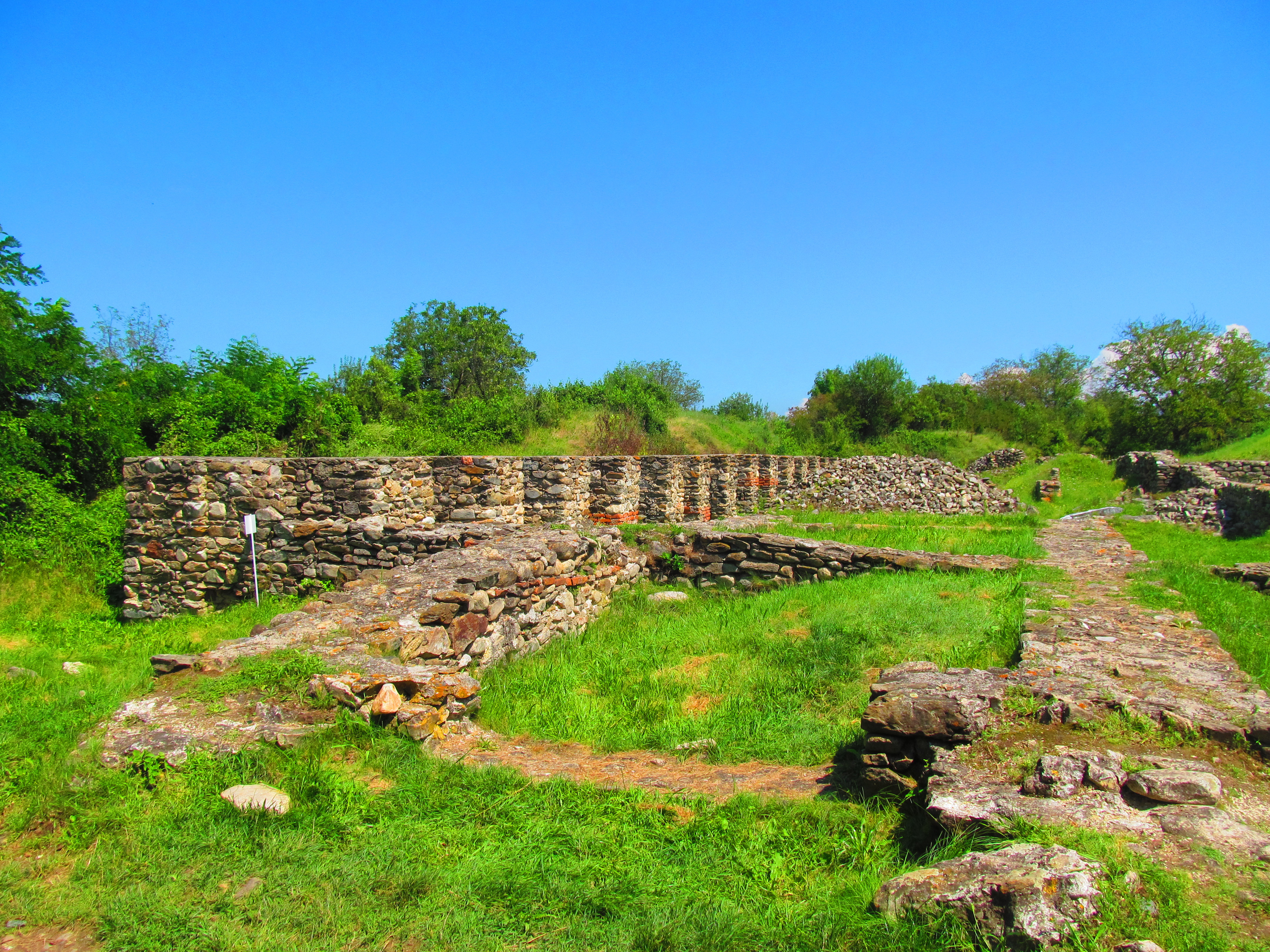 Colonia Ulpia Traiana Augusta Dacica Sarmizegetusa